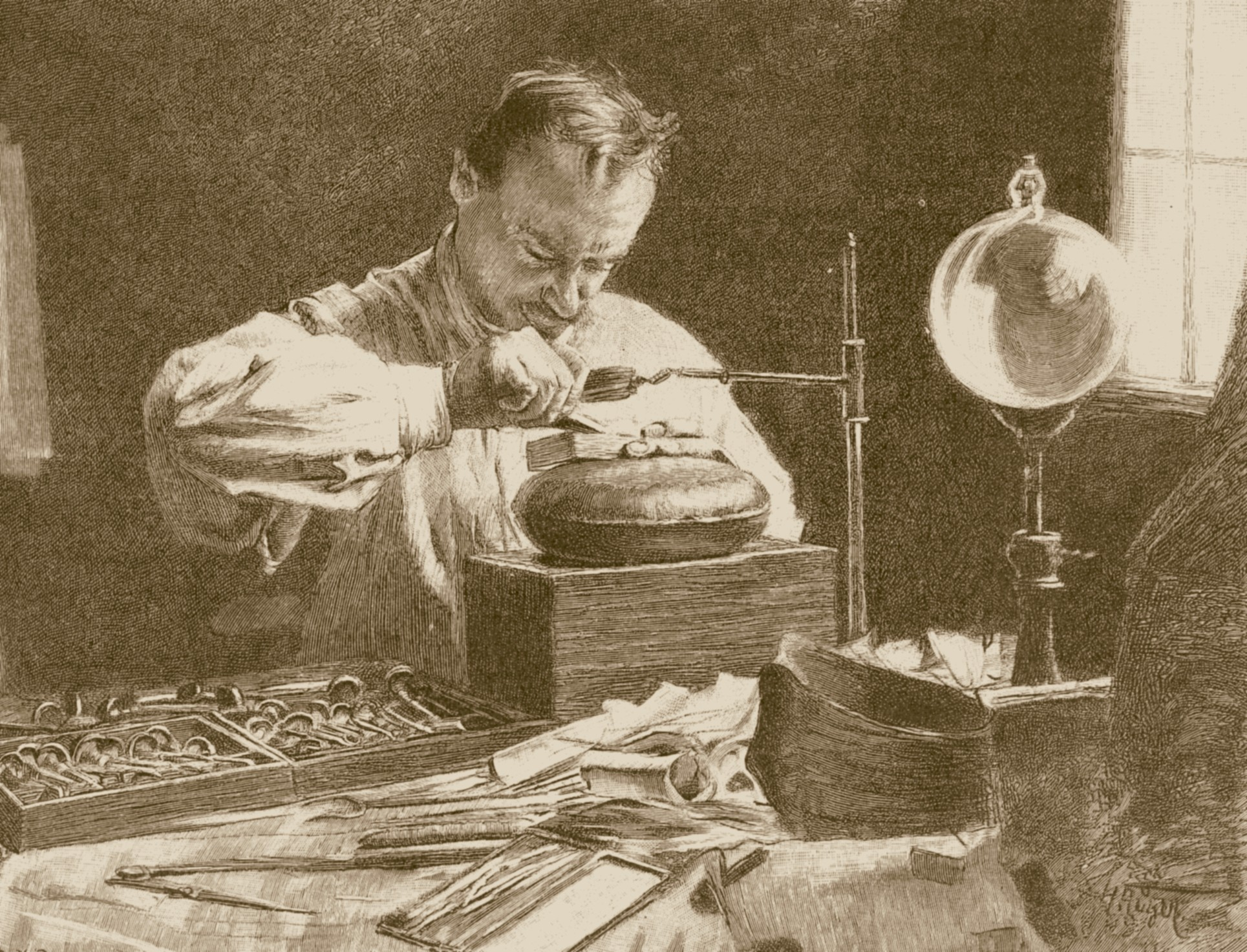 Der Holzschneider